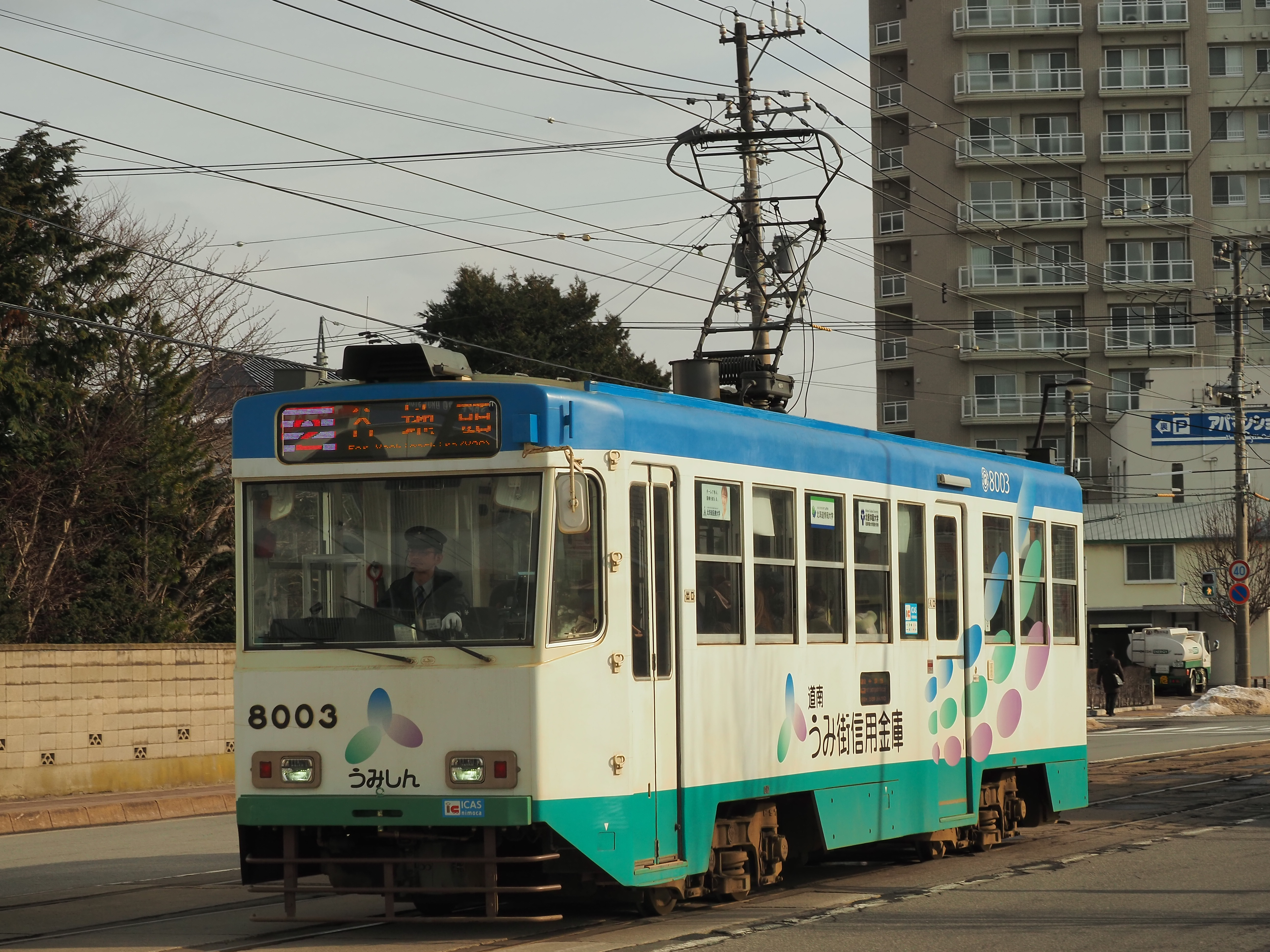 函館市交通局8000系8003号。